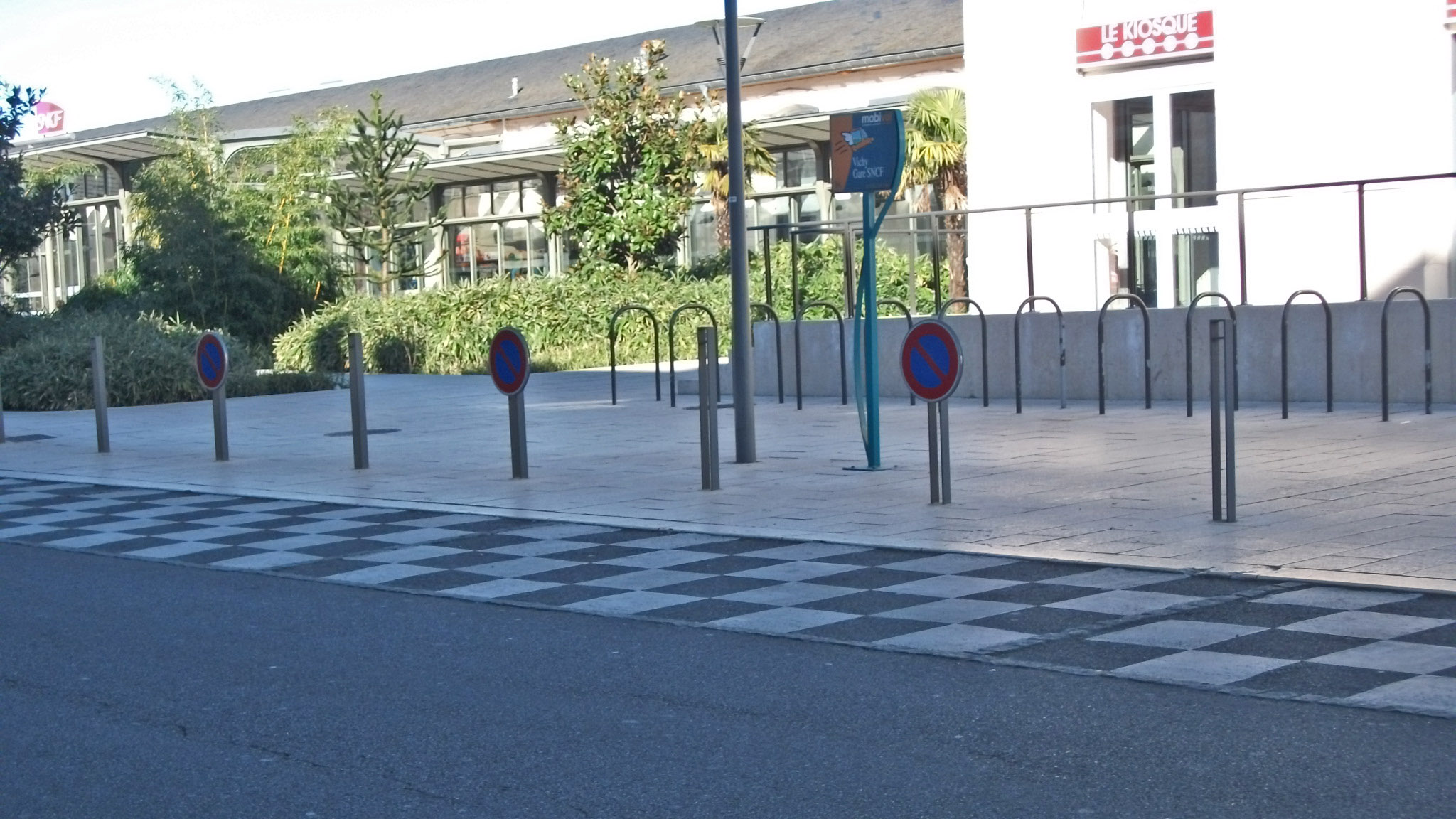 Devant le kiosque MobiVie, le stationnement est interdit (arrêt du service de transport à la demande Mobival - 2 places, ainsi que Mobil'hand - 2 places). 4 panneaux B6a1 fabriqués en 2003 remplaçant pourtant des panneaux plus récents.